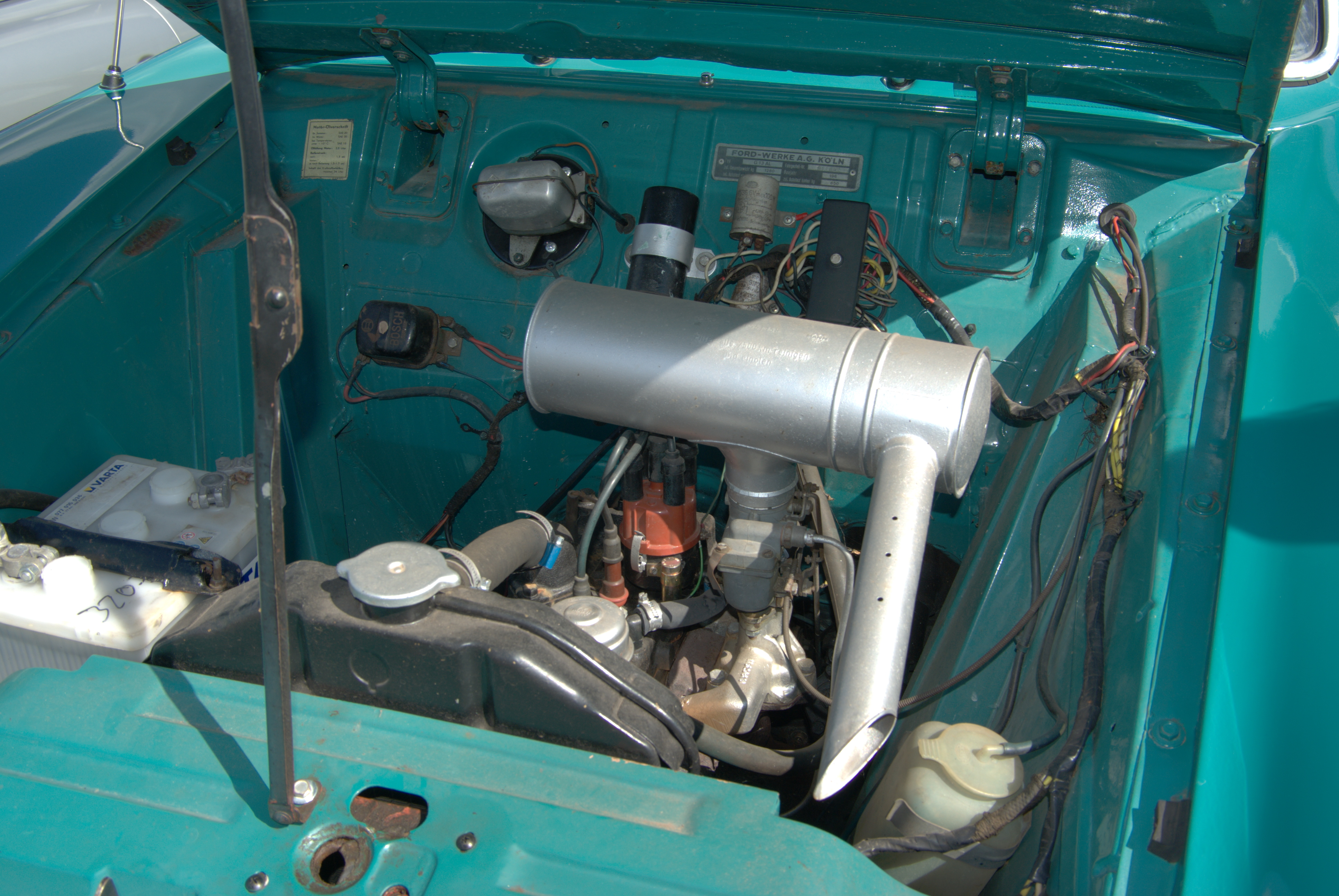 Ford Taunus 12M, Baujahr 1960 Bitburg Classics 2011